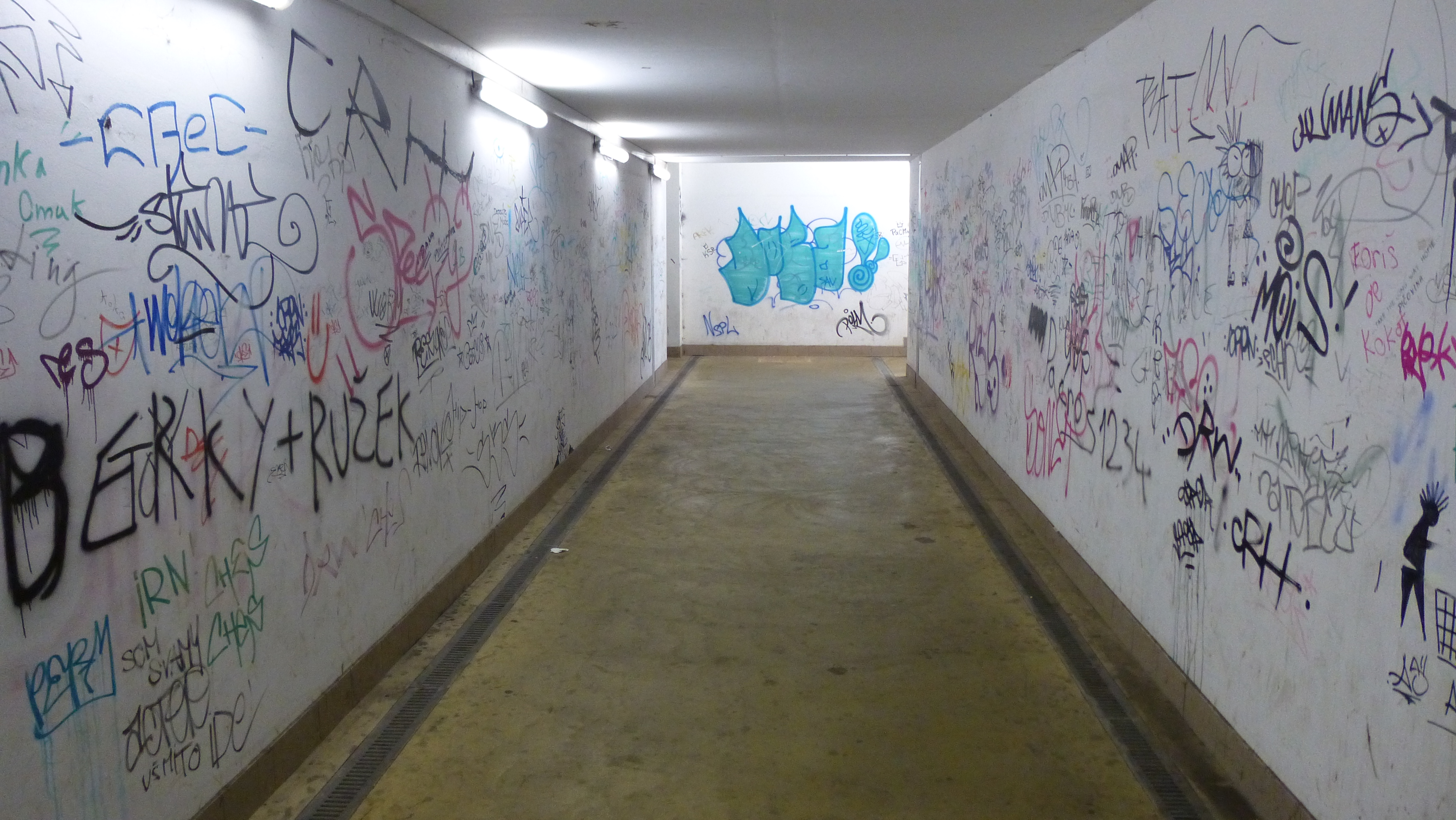 PODCHOD...MADE IN PEZINOK